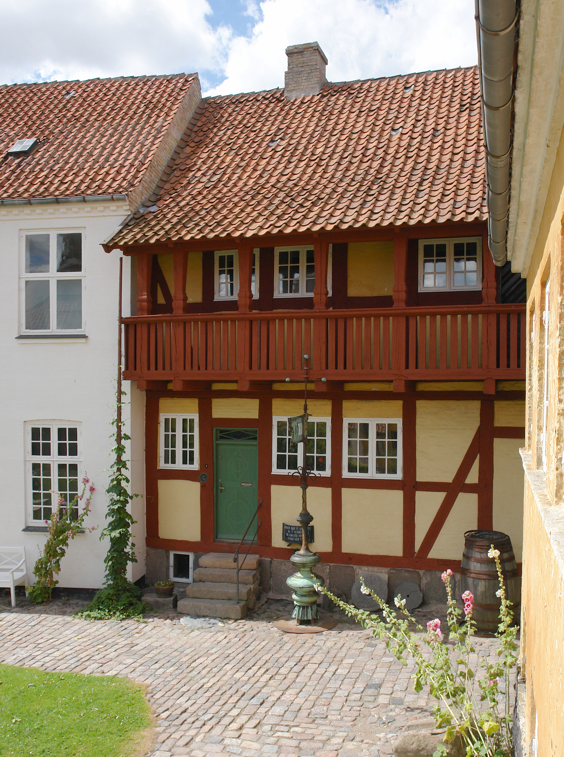 Holbæk Museum: Købmandsgården. Das 1660 gebaute Kaufmannshaus ist das einzige Gebäude im Museums-Komplex, das nicht an seinem ursprünglichen Ort steht. Die großen Granitsteine des Fundamentes gelten als letzte überlebende Reste der alten Pfarrkirche St. Nicolai, die neben dem ursprünglichen Platz des Handelshauses stand.